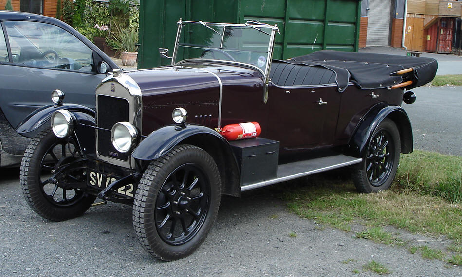 Gwynne 10hp (1929) Photographed by myself in July 2006